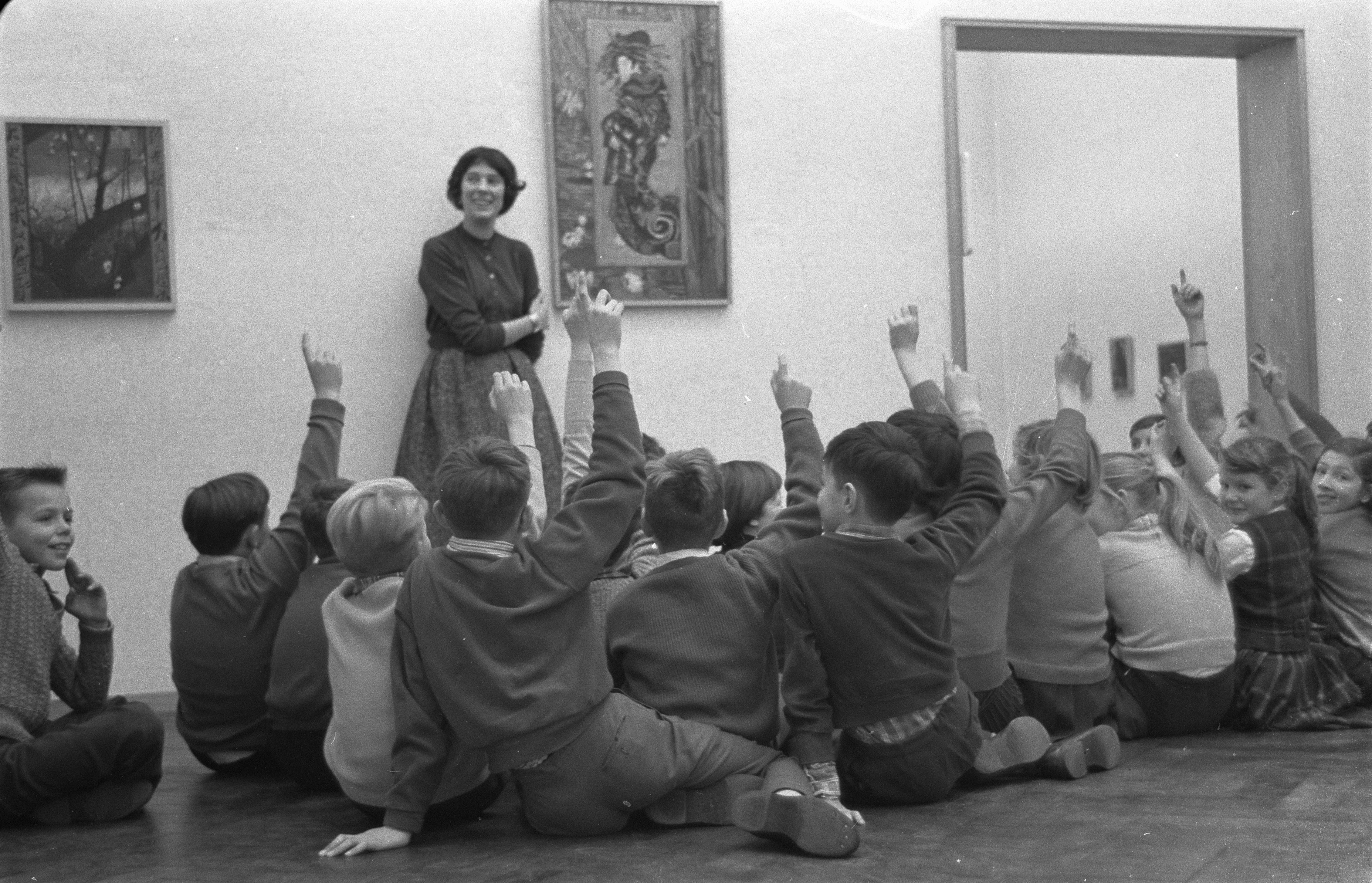 Collectie / Archief : Fotocollectie Anefo Reportage / Serie : [ onbekend ] Beschrijving : Amsterdamse Vondelschool naar de wekelijkse museumles in het Stedelijk Museum Datum : 12 januari 1960 Locatie : Amsterdam, Noord-Holland Trefwoorden : musea, onderwijs, scholieren Instellingsnaam : Vondelschool Fotograaf : Pot, Harry / Anefo Auteursrechthebbende : Nationaal Archief Materiaalsoort : Negatief (zwart/wit) Nummer archiefinventaris : bekijk toegang 2.24.01.05 Bestanddeelnummer : 910-9352